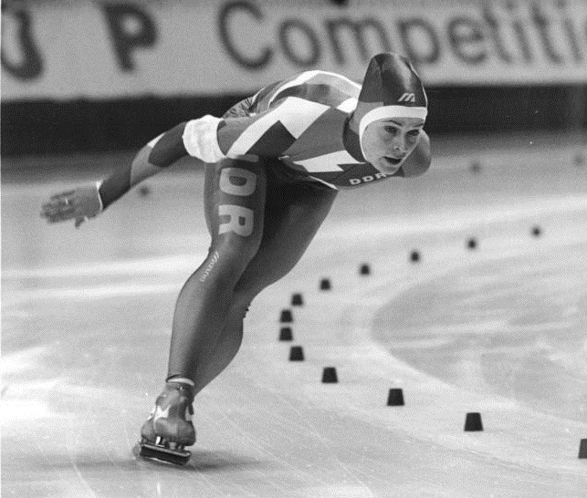 Gunda Kleemann ADN-ZB Settnik 25.11.89 Berlin: Eisschnellauf-Weltcup der Frauen- Zum Auftakt dieser Wettbewerbe in der Eislaufhalle in Hohenschönhausen holten sich die Gestgeberinnen die ersten Siegpunkte. Vizeweltmeisterin Gunda Kleemann gewann die 1.500m in 2:08,73 min. Die Mehrkampf-Spezialistinnen starteten erstmals in den hellblauen Laufanzügen der japanischen Ausrüsterfirma Mizuno.